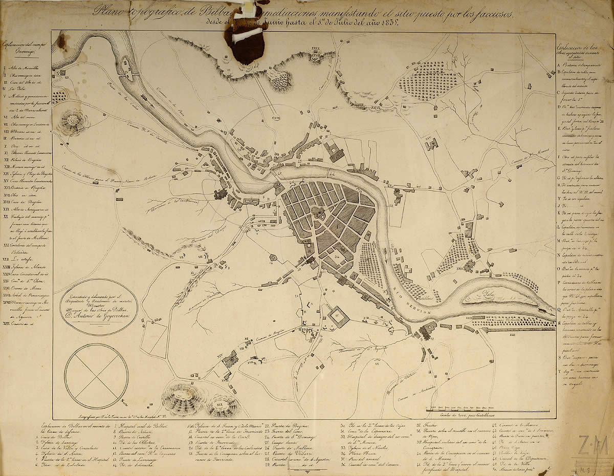 Bilboko eta inguruetako plano topografikoa, matxinatuek 1835eko ekainaren 10etik uztailaren 1era arte ezarritako setioa jasotzen duena. Zumalakarregi Museoko bilduma.